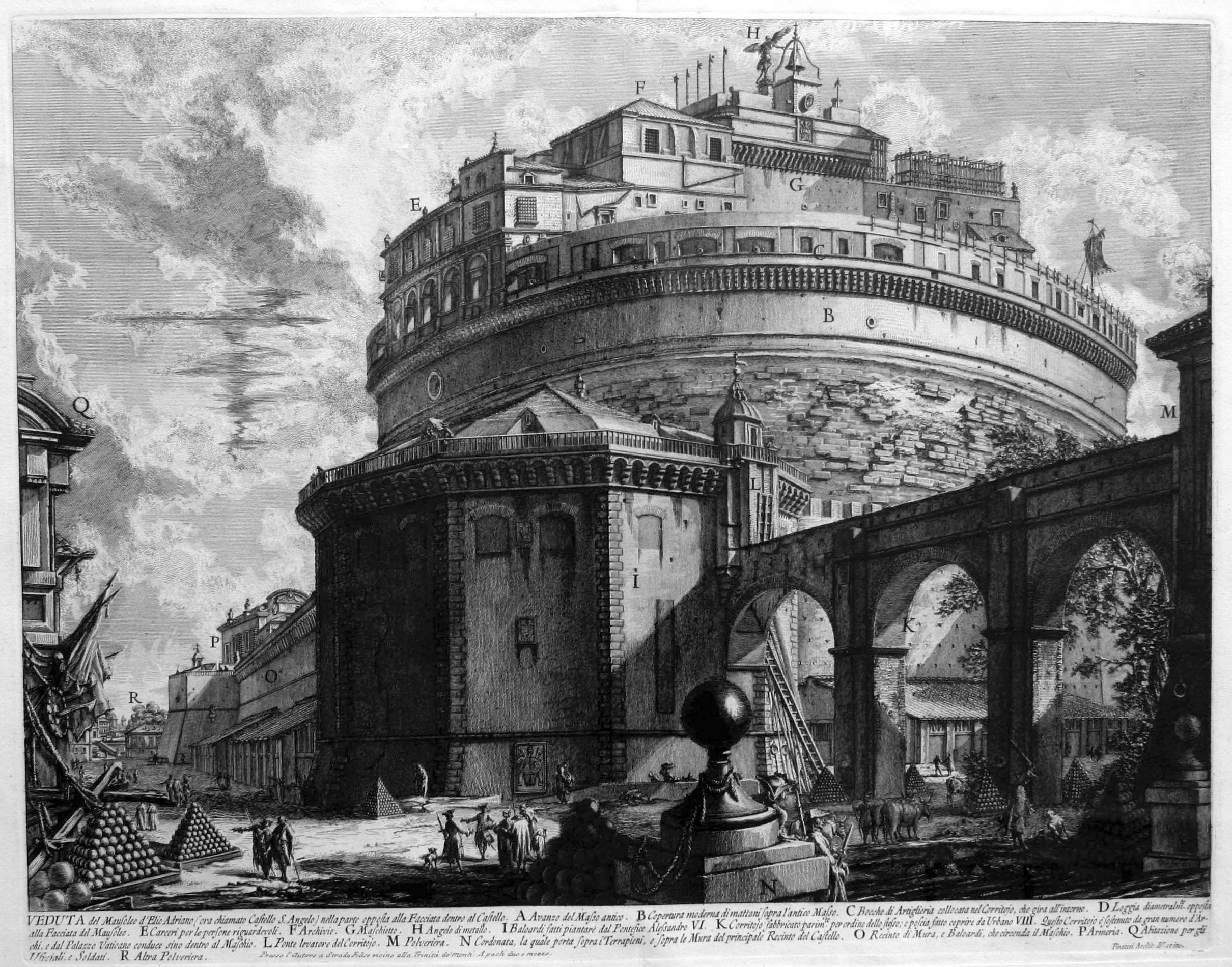 Roma - Fortificazioni volute da papa Alessandro VI a difesa di Castel Sant'Angelo (Antonio da Sangallo il Vecchio).